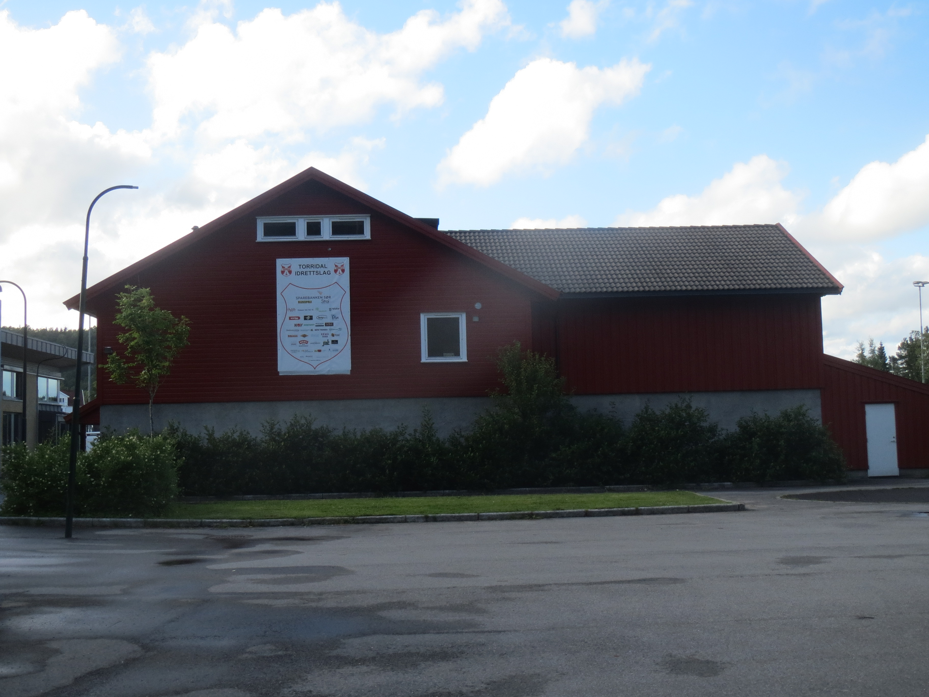 Torridal idrettslags klubbhus, Hommeren i Torridal, Kristiansand S